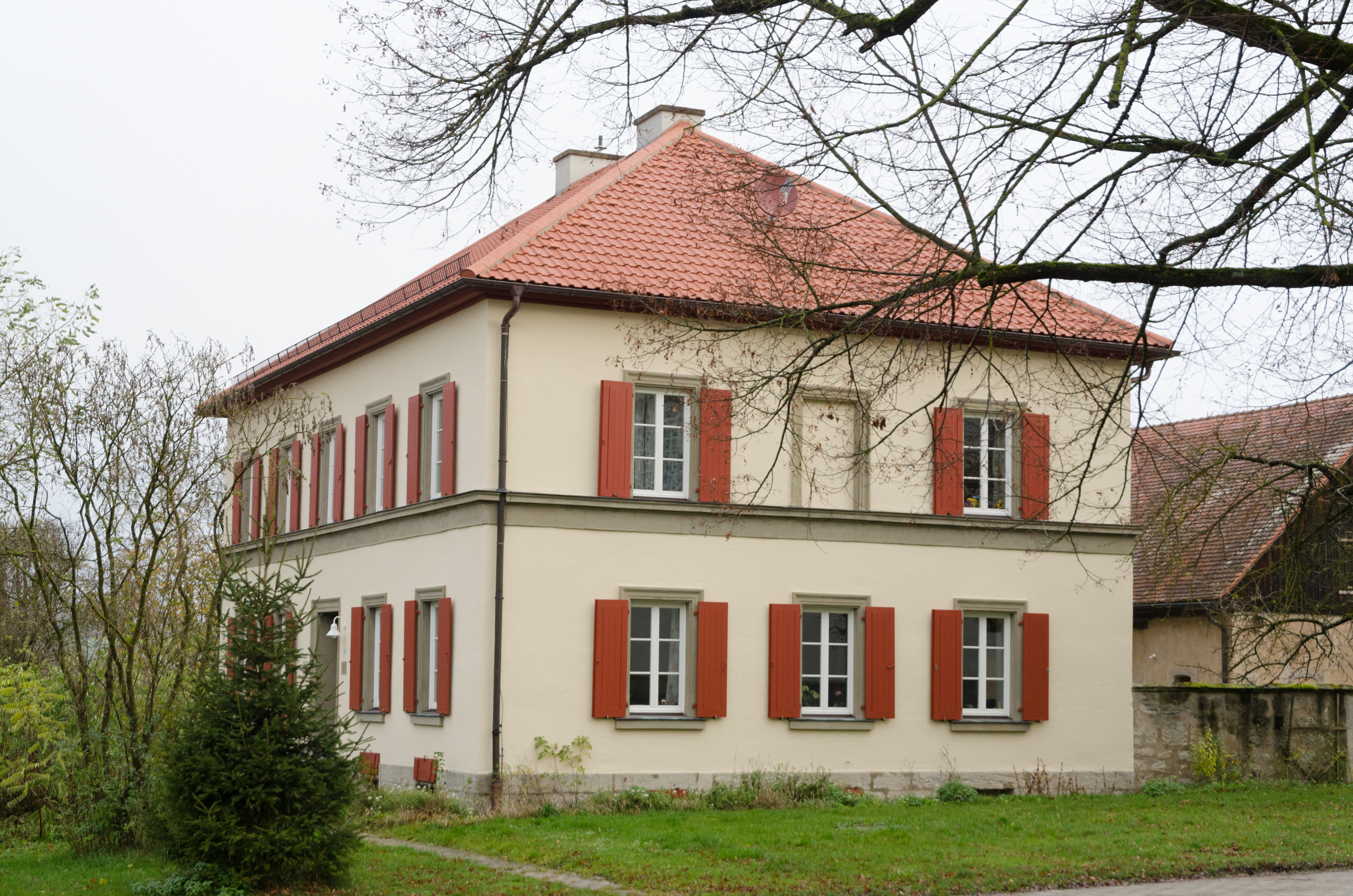 Oberoestheim, Kirchplatz 8